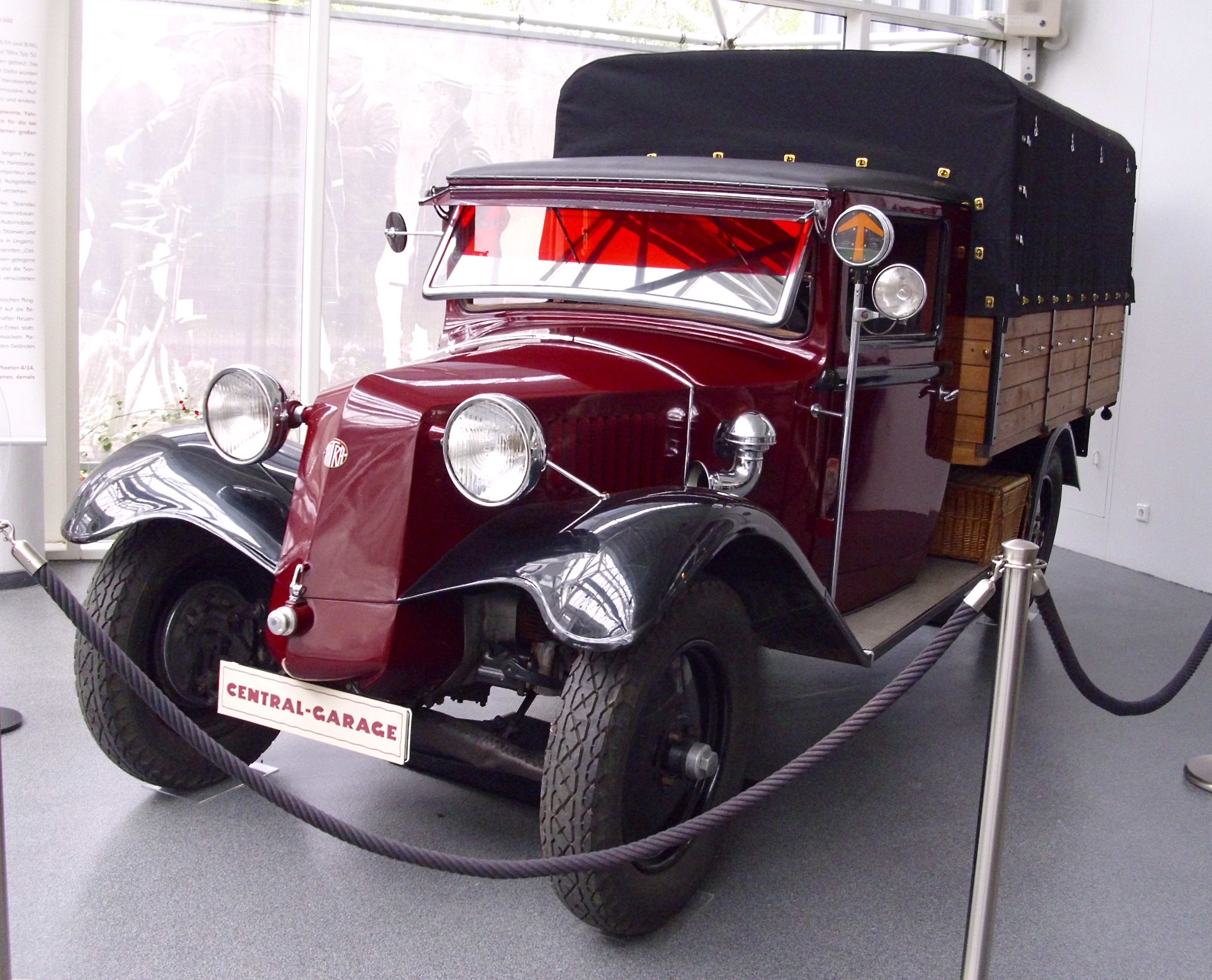 Tatra 8/40 PS von 1931, hergestellt durch die Deutsche Licenz Tatra